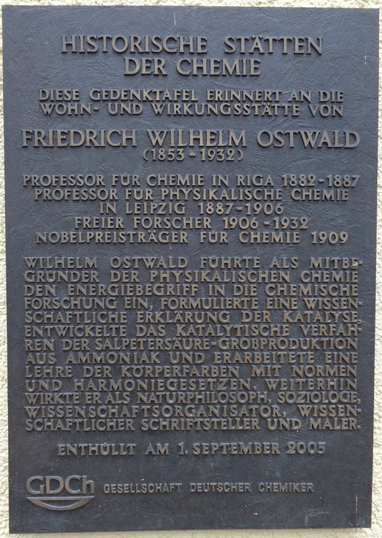 Gedenktafel „Historische Stätten der Chemie“ der GDCh zu Ehren von Wilhelm Ostwald am Haus Energie im Wilhelm-Ostwald-Park, Großbothen, Grimmaer Straße 25